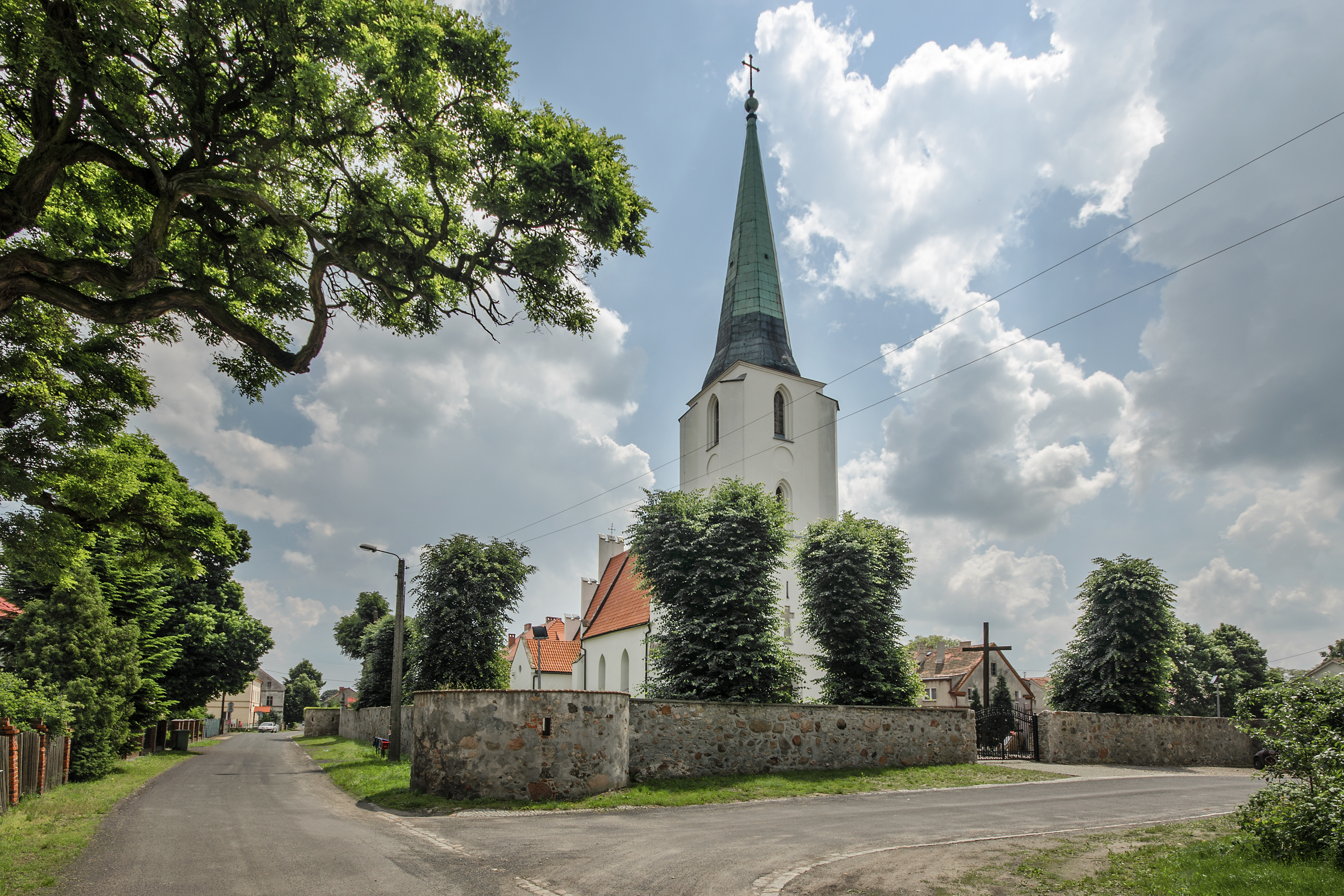 Lutynia, mur obronny wokół cmentarza, XIV, XVI